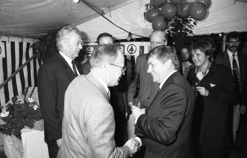 Bonn, 17.10.1991 Eröffnung der Landesvertretung Mecklenburg-Vorpommern durch Ministerpräsident Dr. Alfred Gomolka in der ehemaligen Landesvertretung Niedersachsen